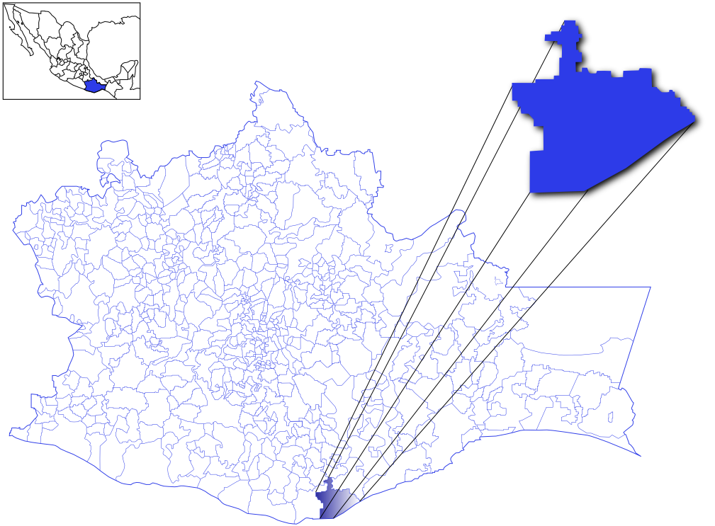 Este es un mapa del municipio oaxaqueño de Santa María Huatulco, Mèxico. Fue elaborado con Inkscape.